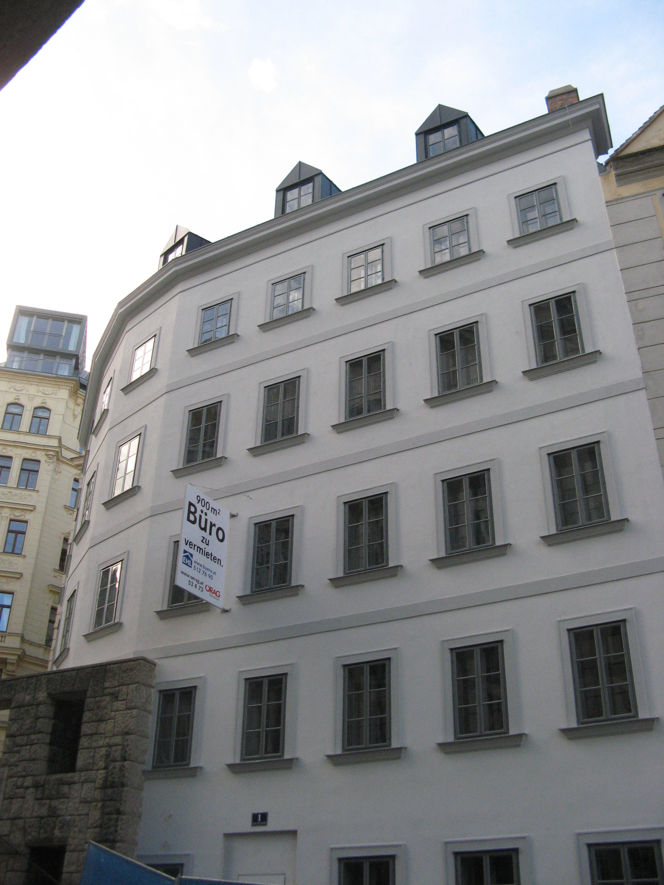 Bürgerhaus (1. Viertel 17. Jahrhundert), Am Gestade 1, Wien-Innere Stadt